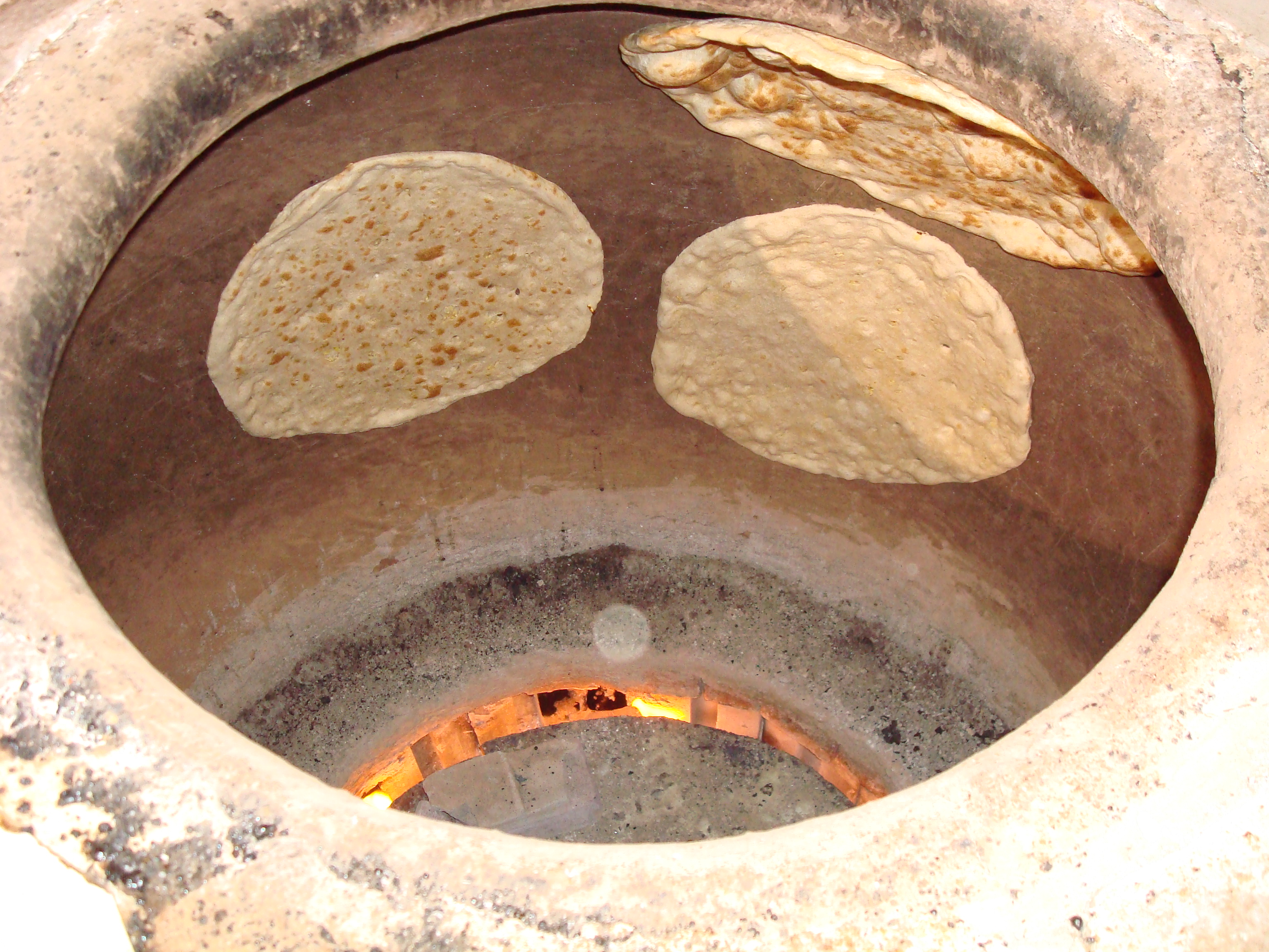 തമീസ് - അറബികളുടെയും അഫ്‌ഗാനികളുടെയും ഭക്ഷണം. - ചൂളയിൽ ചുട്ടെടുക്കുന്നു.